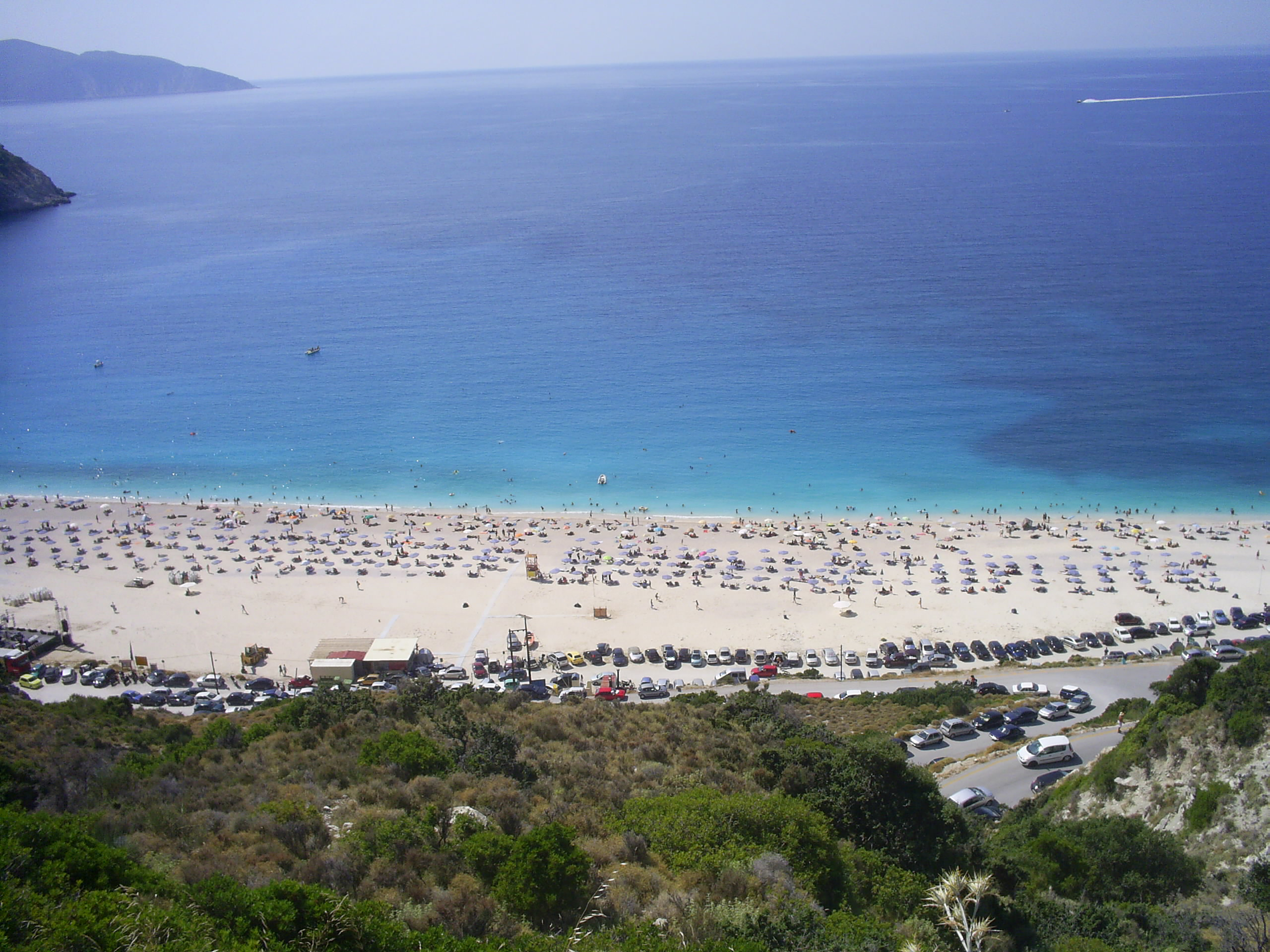 Myrtos bay Kefallonia